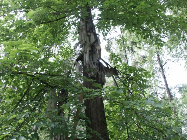 Suomalais-ugrilainen uhrilehto vuonna 2002. Jumalalle pyhitetty puu uhrilahjoineen Marin tasavallassa.